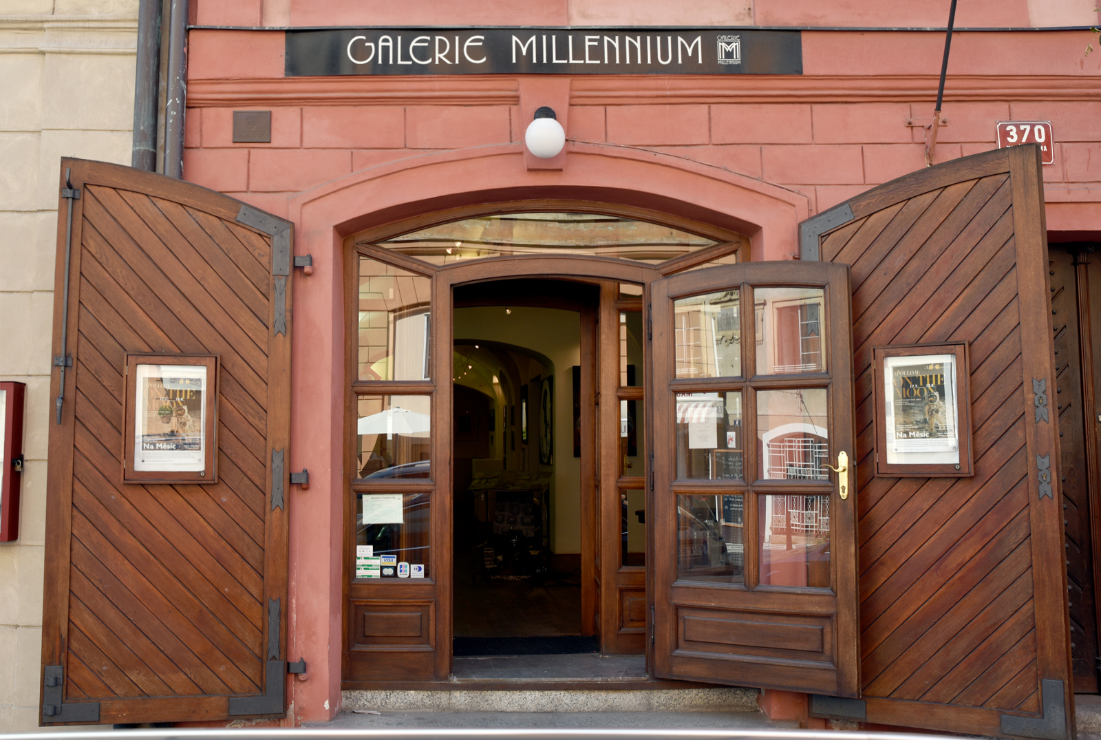 Galerie Millenium, Tržiště 5, Malá Strana, Praha 1